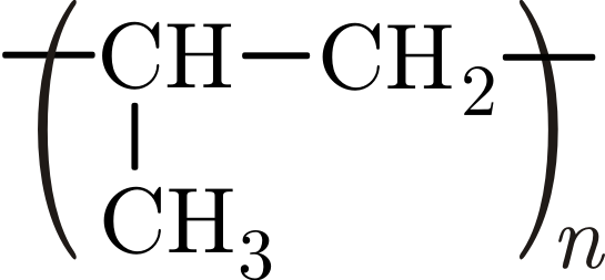 polypropylene structure